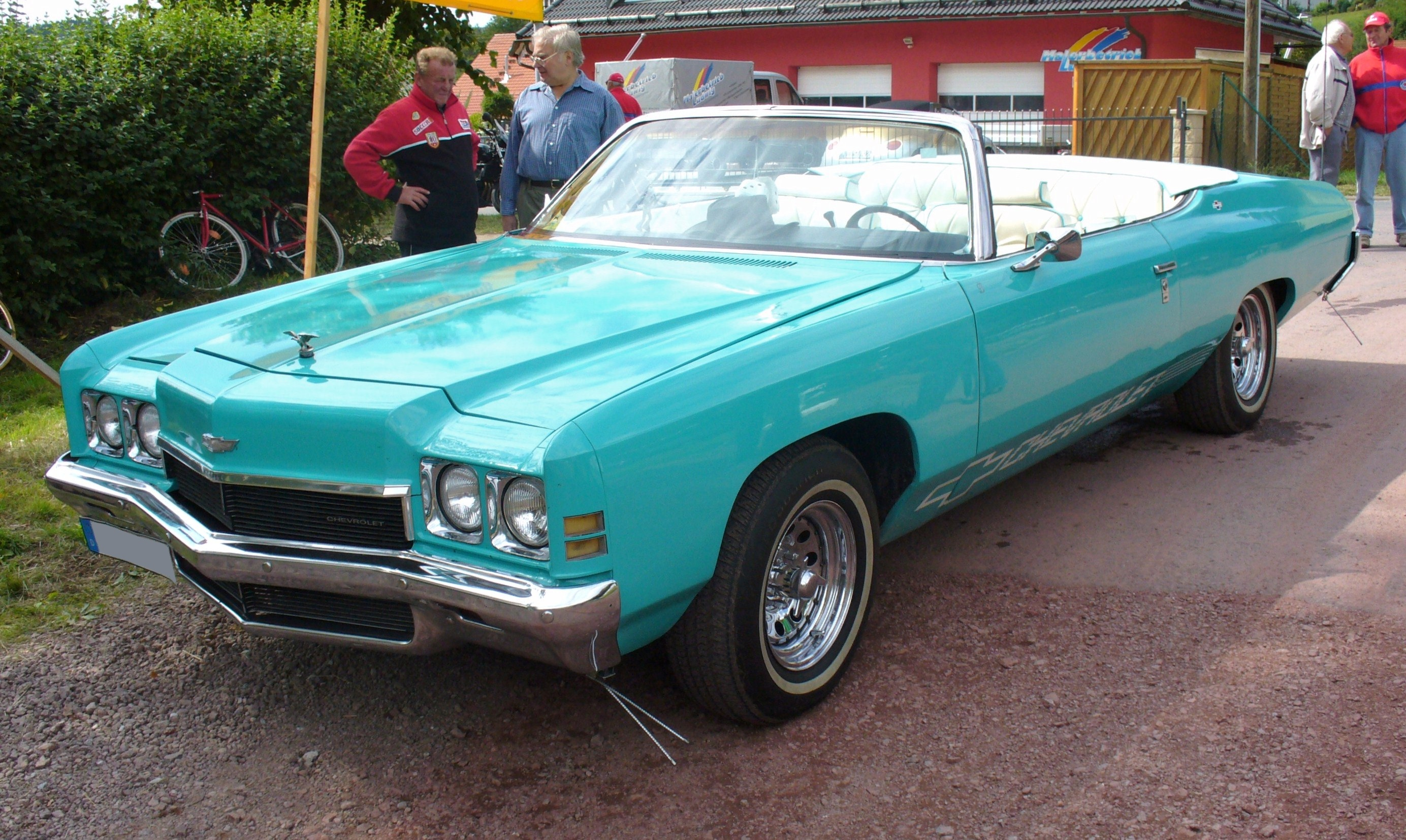 Chevrolet Impala Convertible 1972